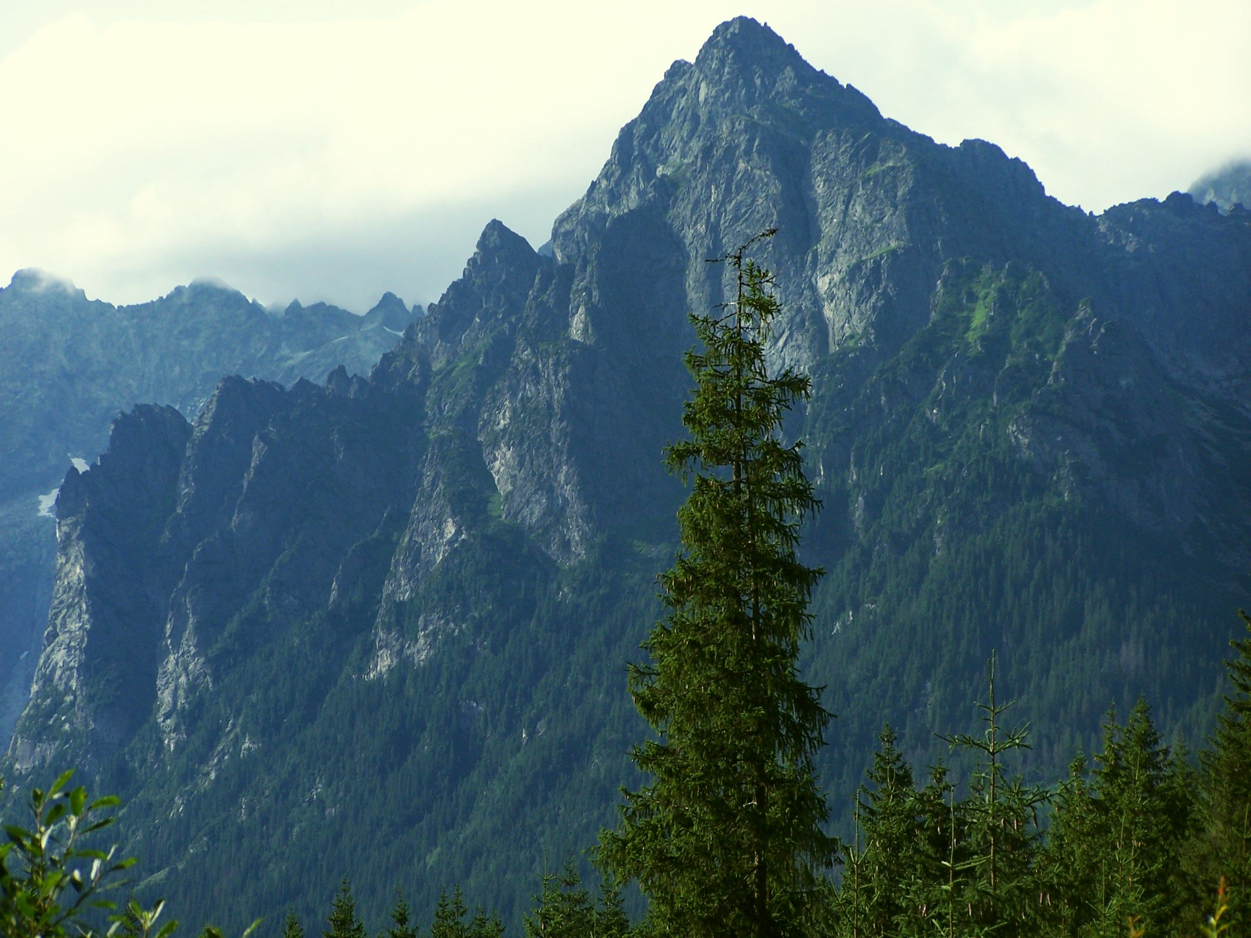 Młynarz (Tatra Mountains)